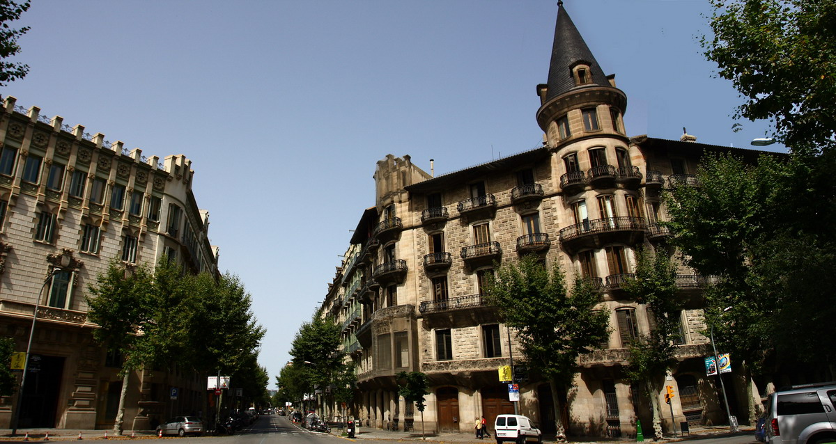 Casa Burés, obra modernista de Francesc Berenguer i Mestres Construïda entre 1900-1905. Vista de la Casa Bures (a la dreta de la imatge) on s'observa que la torre esquerra no està coronada amb una cúpula cònica, sinò que imita el capcir de la casa de davant (Casa Antoni Roger, d'Enric Sagnier).